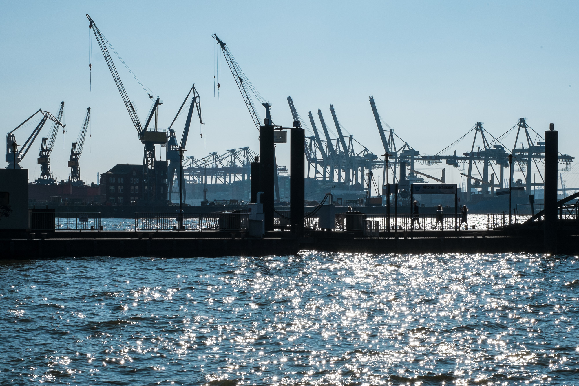 Hamburg, Blick auf den Hafen vom Ufer an der Fischauktionshalle